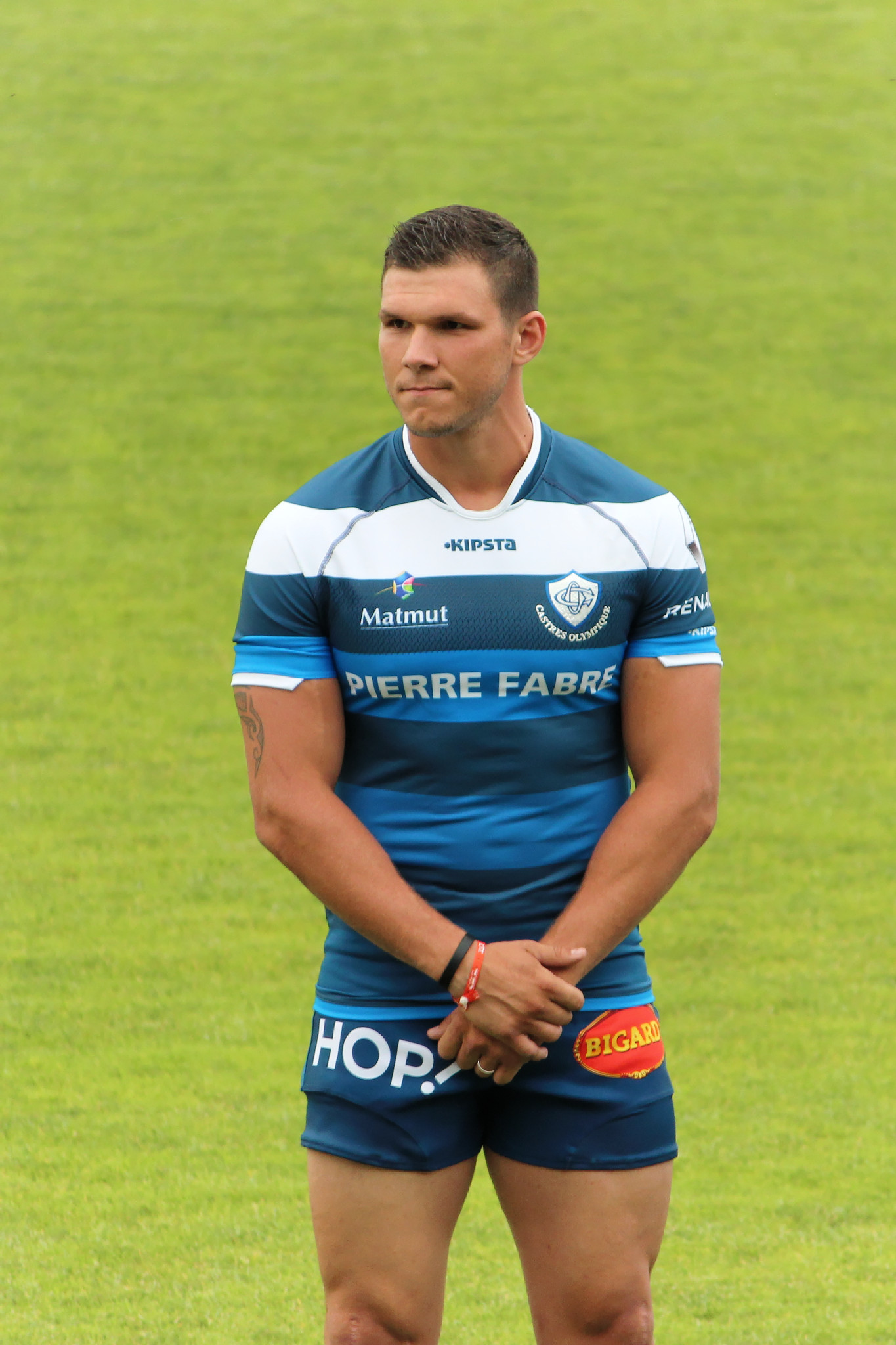 Joueurs du Castres Olympique lors de la présentation de l'équipe pour la saison 2015-2016